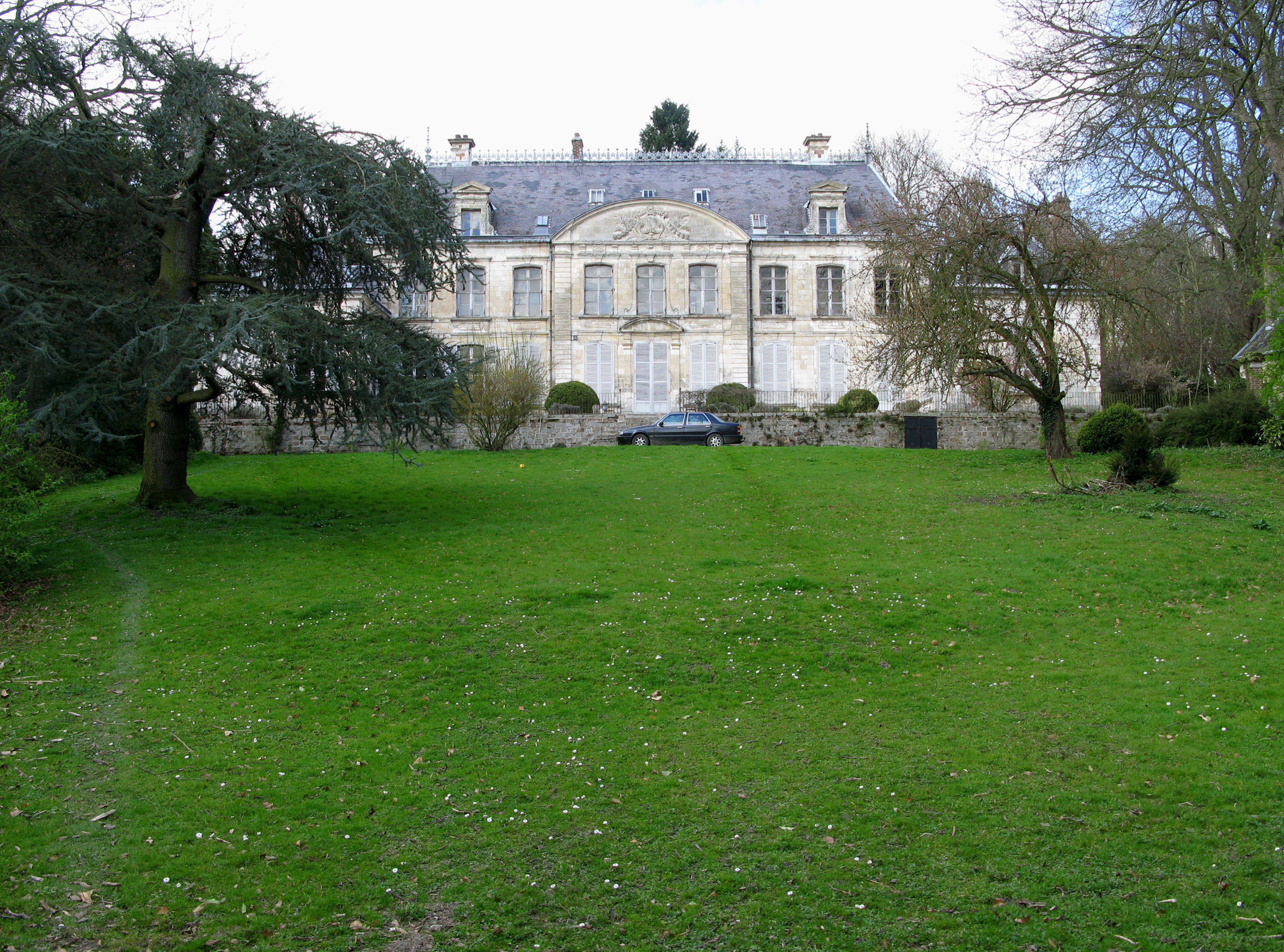 Contay (Somme, France) - Le château, vu de la rue, à travers la grille de la propriété installée entre les murs.